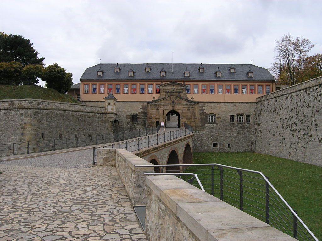 Kommandantenhaus (errichtet 1669) mit dem Peterstor (errichtet zwischen 1666 und 1668) und der Zufahrtsbrücke Peterstor (errichtet 1670), am Eingang der Zitadelle Petersberg in Erfurt